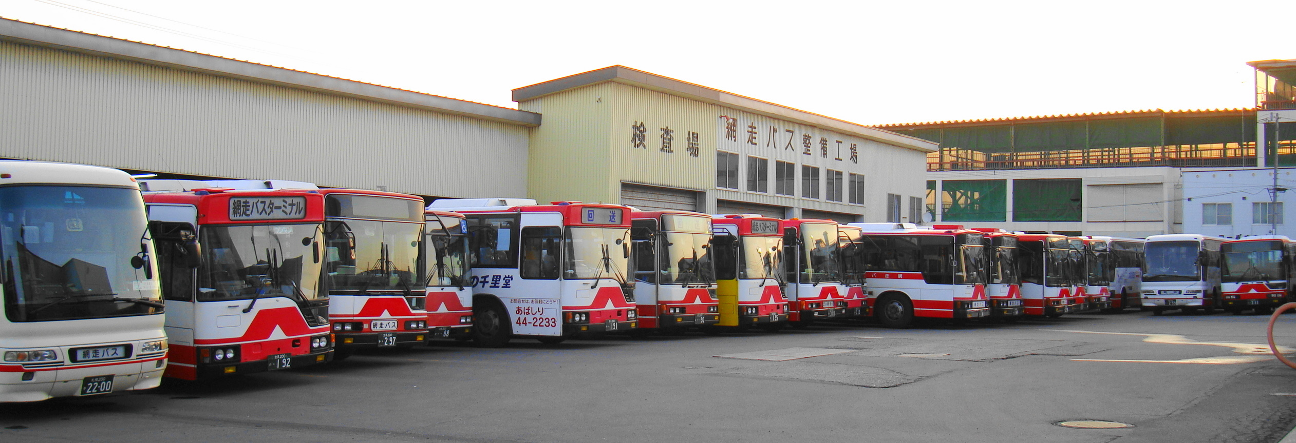 Abashiri Bus terminal